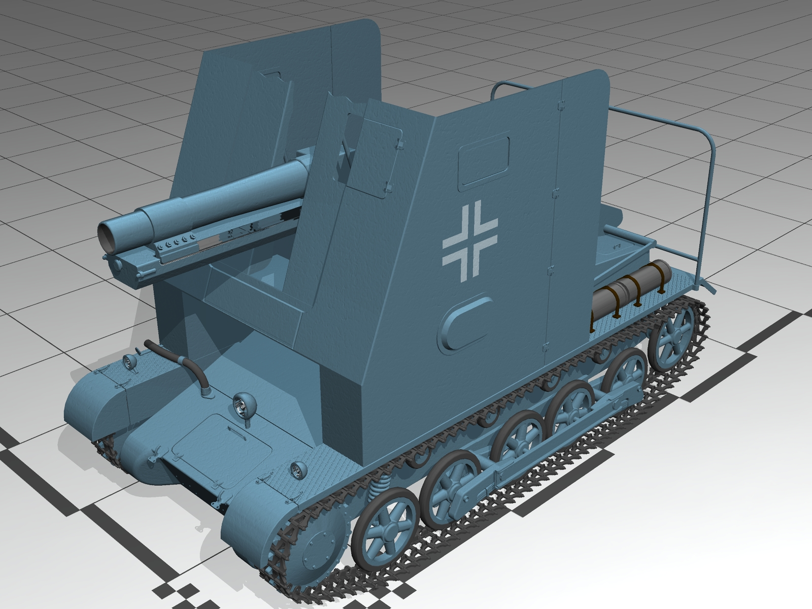 Sturmpanzer I B (15cm sIG auf PzKpfw I Ausf. B)